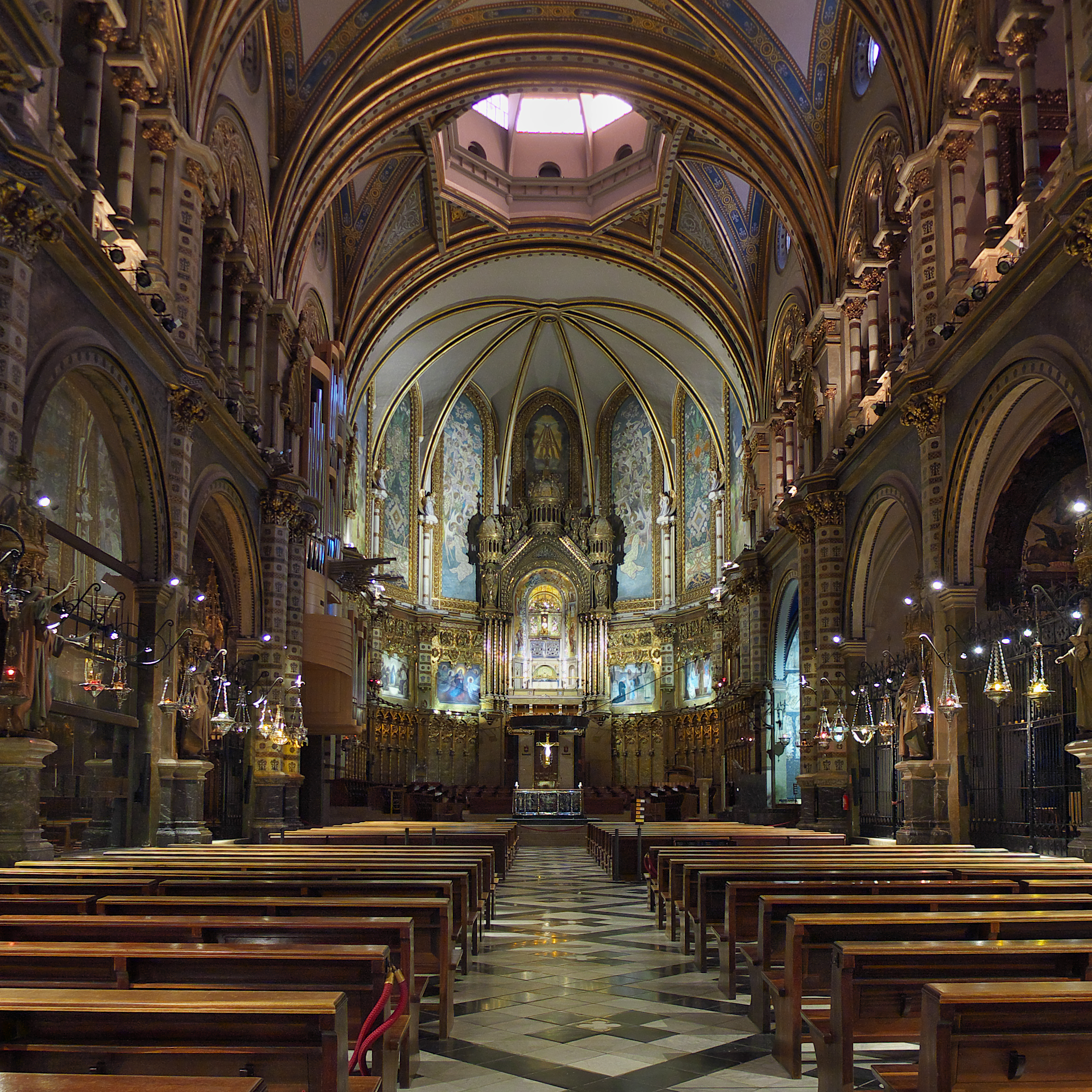 Arcadi Pla Masmiquel entre 1991 a 1995 restaura la totalidad de la basílica.